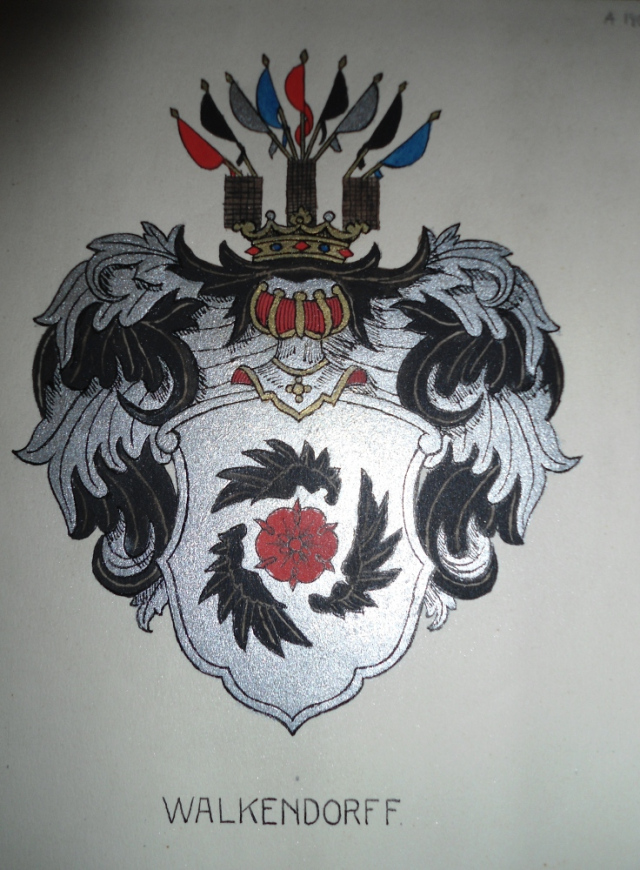 Vapensköld tillhörande ätten Walkendorff nr 25 målad 1900 av Tersmeden foto: Ann Walkendorff